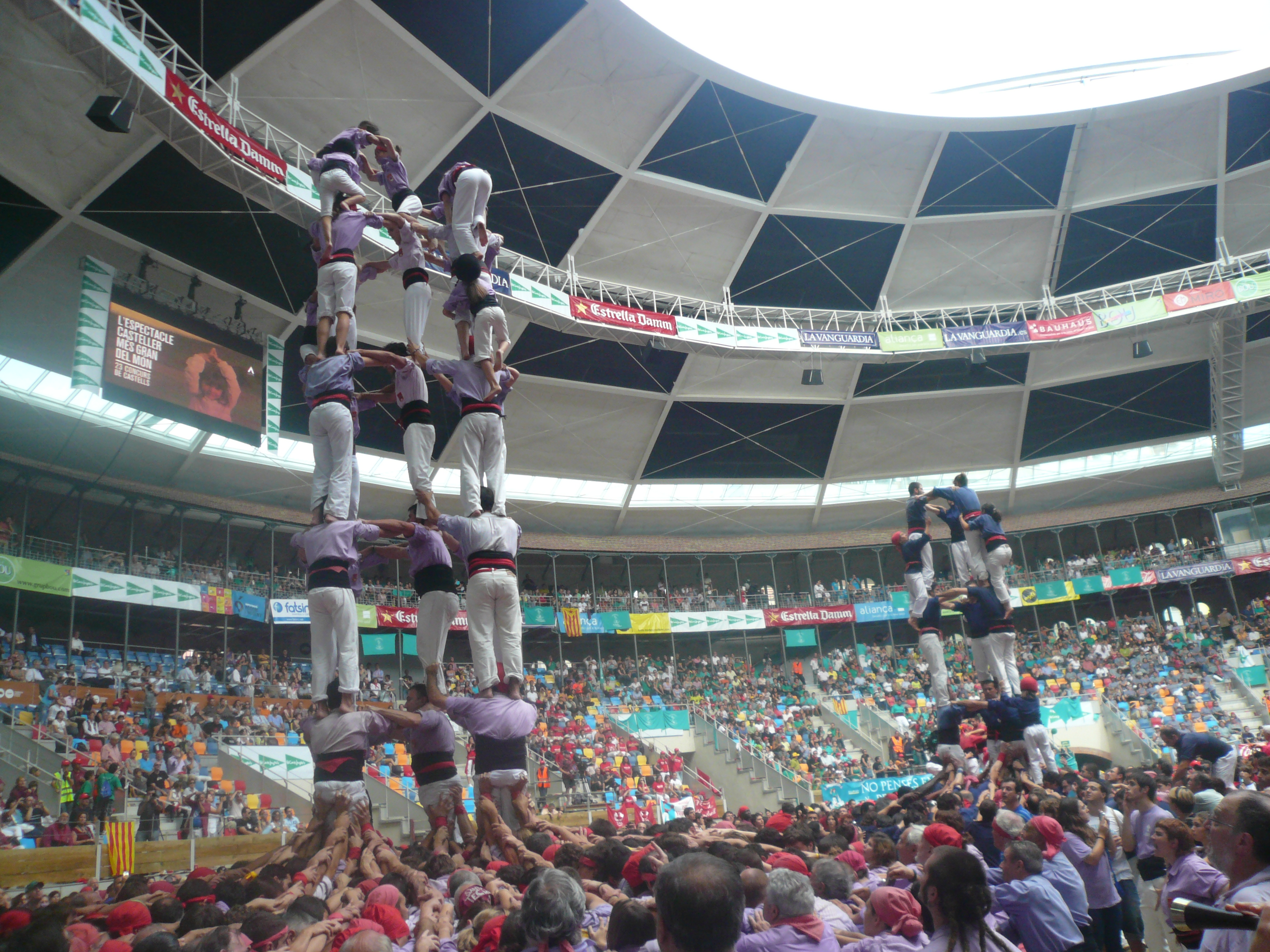 Concurs de Castells 2010, a la plaça de Toros de Tarragona, rebatejada com a Tarraco Arena. Object location41° 06′ 51.64″ N, 1° 14′ 43.03″ E